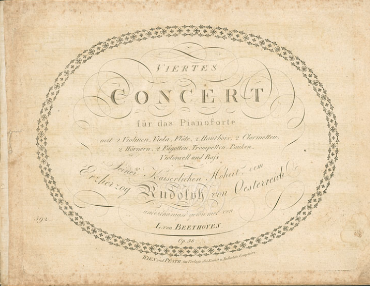 Page de garde de la première édition du Concerto pour piano n° 4 en sol majeur Op. 58 de Ludwig van Beethoven (1808). Edition Viennoise du Bureau des Arts et d'Industrie.